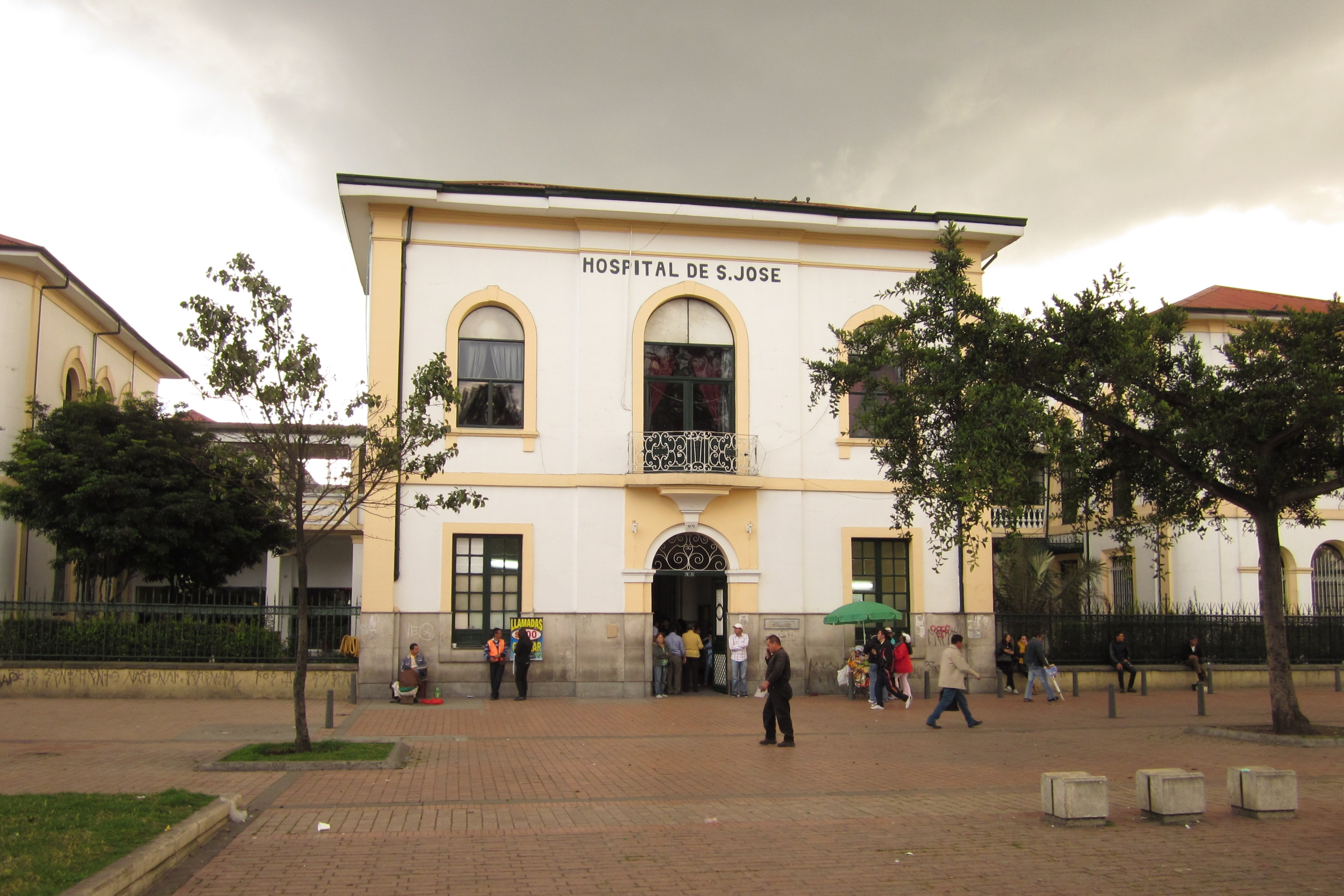 Hospital de San José en la plaza España de Bogotá, localidad de Los Mártires. Límite entre los barrios Voto Nacional Y la Estanzuela.